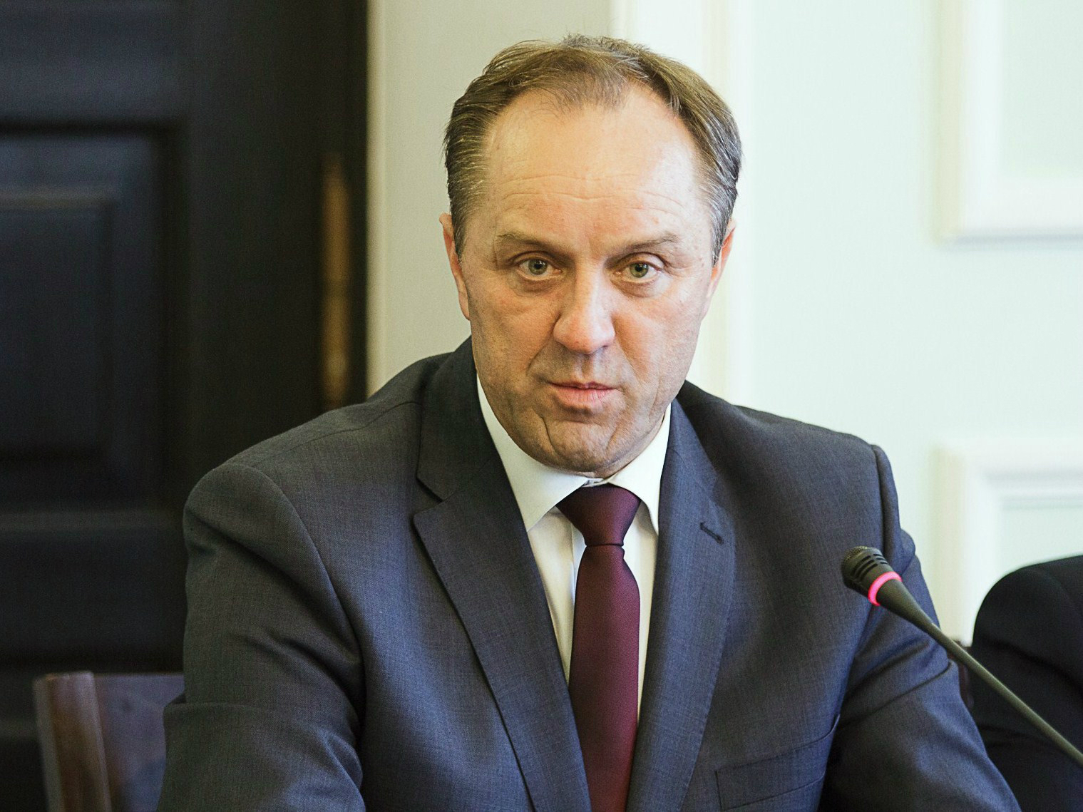 Mieczysław Struk, samorządowiec.